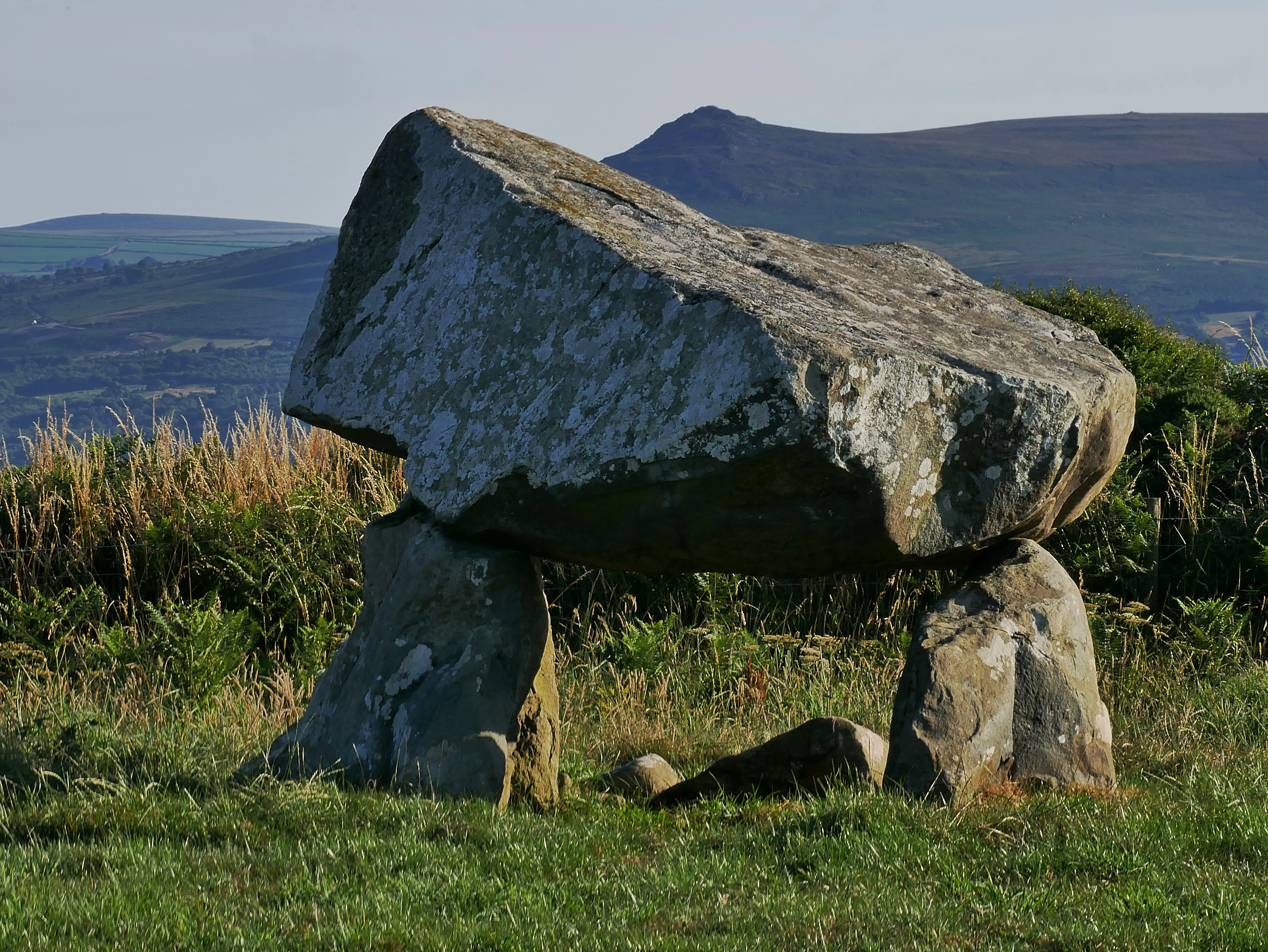 The Neolithic burial chamber Llech-y-Dribbed, or Llech-y-Trypedd, ¾ of a mile from the village of Moylgrove, in Pembrokeshire (Wales).